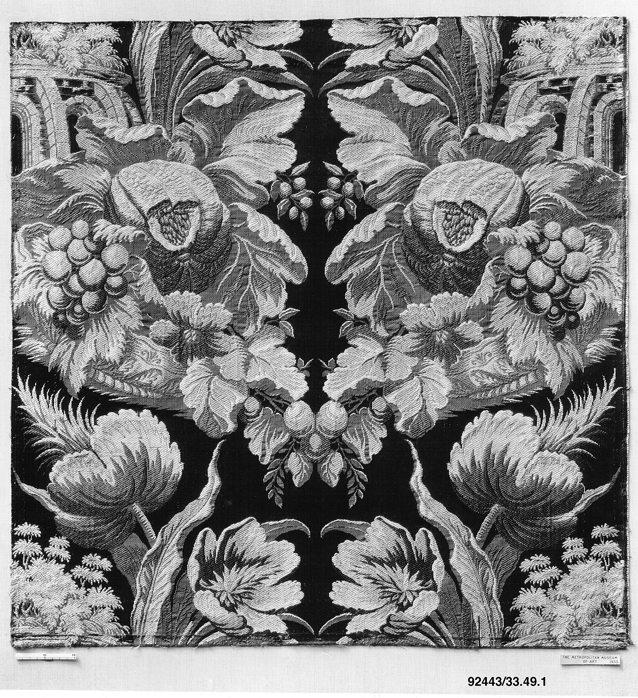 Fragment de soie tissée. 55.9 x 54.6 cm. Metropolitan Museum, Rogers Fund, Inv. 3.49.1